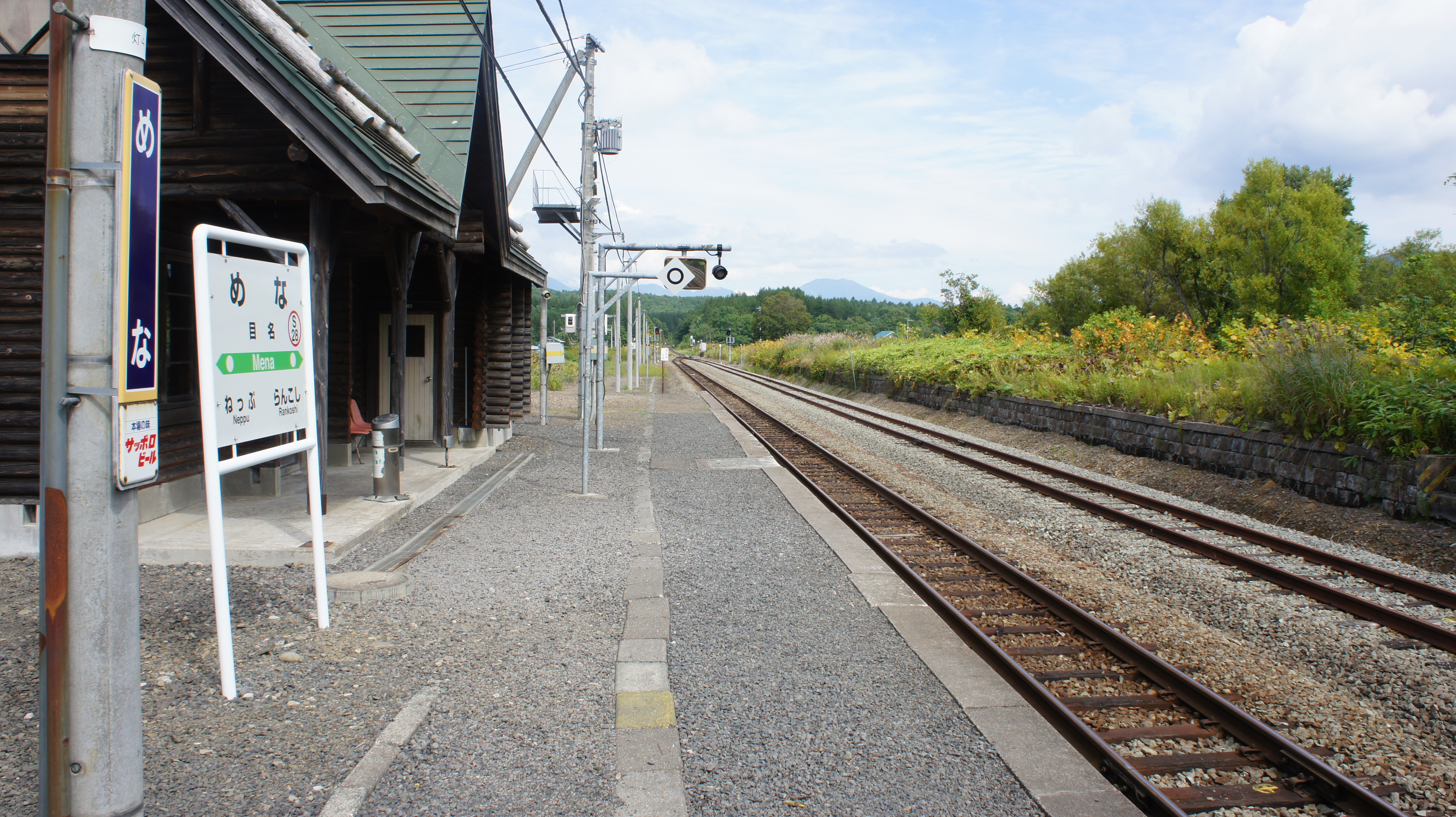 JR函館本線・目名駅のホーム Sony NEX-3